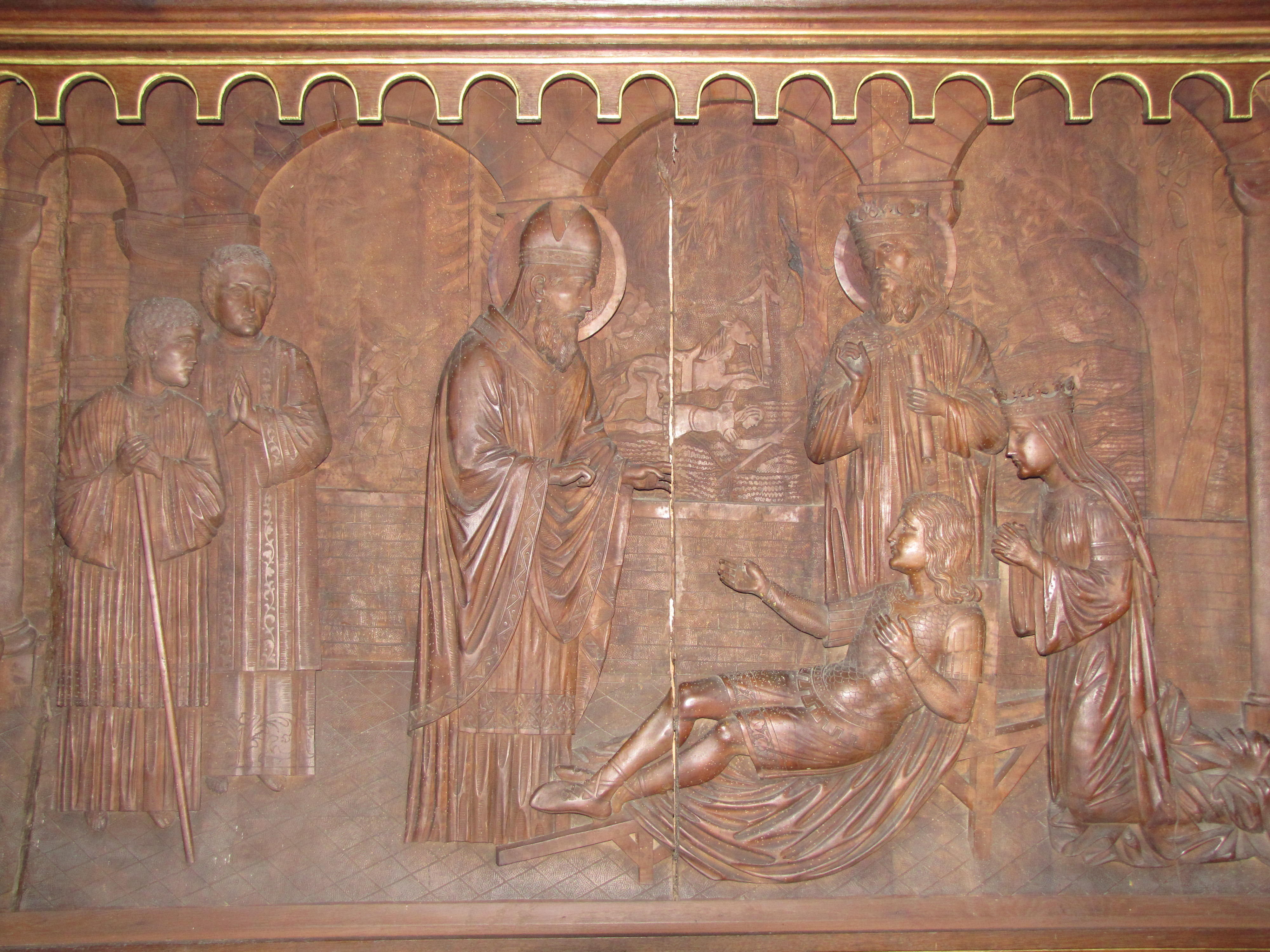 Alsace, Bas-Rhin, Surbourg, Abbatiale Saint-Jean-Baptiste (PA00085200, IA00119029). Bas-relief "Saint Arbogast ressuscitant Sigebert IV, fils du roi Dagobert II" (XIXe)